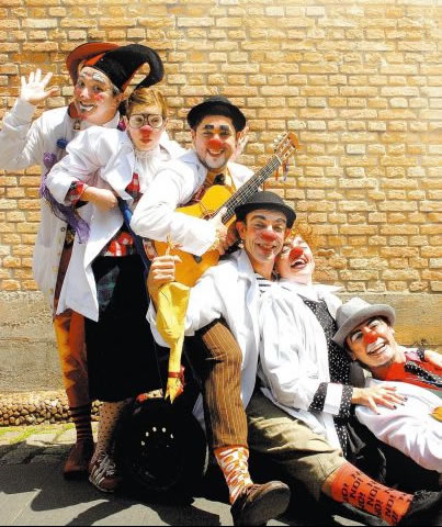 Os Doutores da Alegria fizeram check-ups e apresentaram seu trabalho no Risadaria. #funfunfun Conheça também nossa FanPage: Outras FanPages da Devassa: Para acompanhar a Devassa